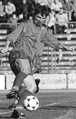 Title: FC Hansa Rostock - 1. FC Magdeburg 0:0 Additional information: Schreibweise des Namens: Rainer Jarohs und vermutlich ebenfalls Jens Jarohs Factual corrections and alternative descriptions are encouraged separately from the original description. Additionally errors can be reported at this page to inform the Bundesarchiv. Original historic description: ADN-ZB-Sindermann- -3.3.90-Le-Rostock: Fußball-Oberliga- Beim Punktspiel zwischen dem FC Hansa Rostock und dem 1. FC Magdeburg (0:0) lieferten beide Mannschaften eine enttäuschende Leistung. Nach Randalen während der Halbzeitpause stand die Begegnung vor dem Abbruch. Am Ball Hansa-Stürmer Rainer Jahros; links Dirk Schuster, rechts Jens Jahros(beide Magdeburg).